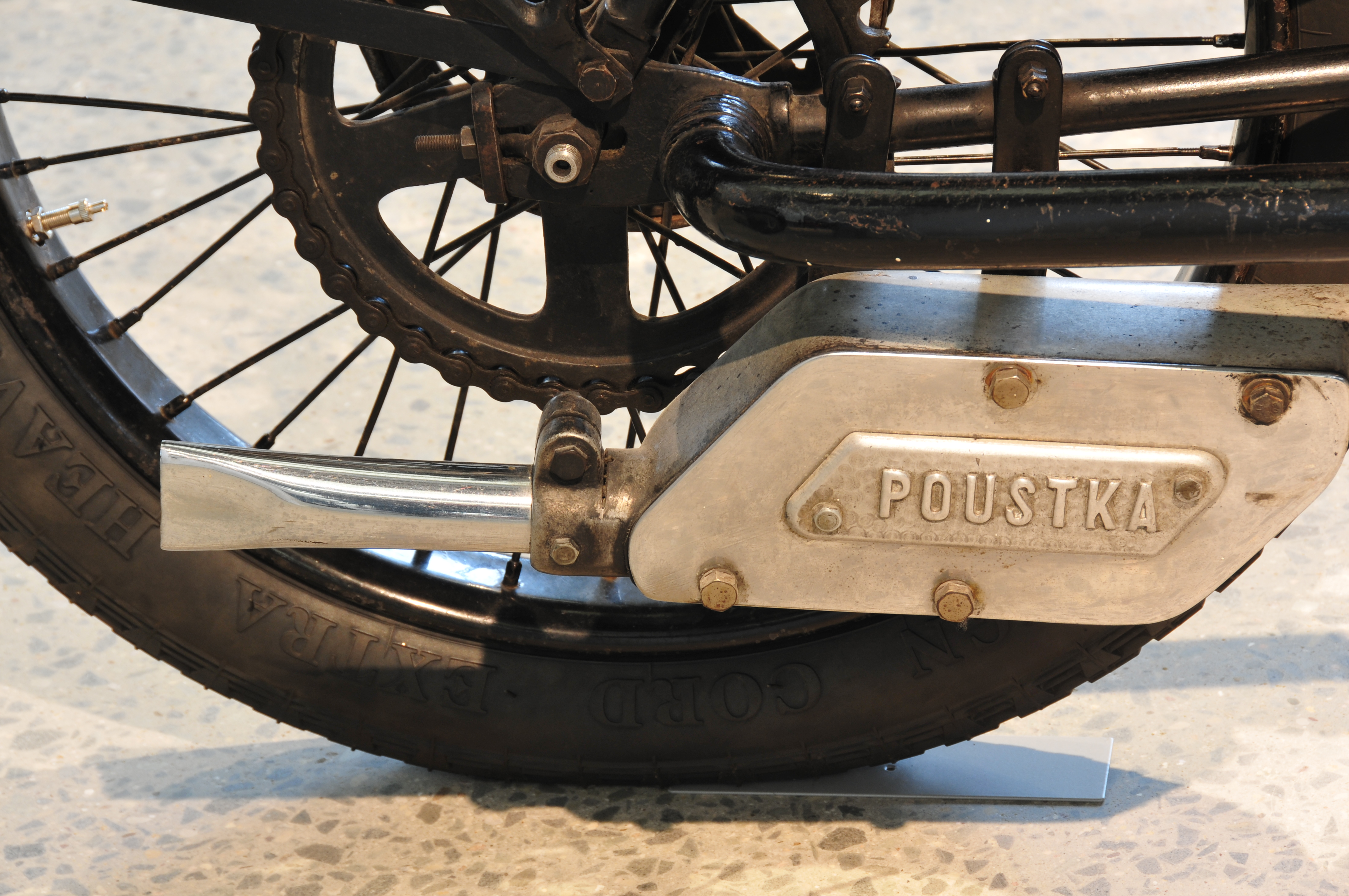 Fototermin Škoda Museum Mladá Boleslav 2013 Fototermin Škoda Muzeum 5. April 2013 in Mladá Boleslav This work is free and may be used by anyone for any purpose. If you wish to use this content, you do not need to request permission as long as you follow any licensing requirements mentioned on this page.